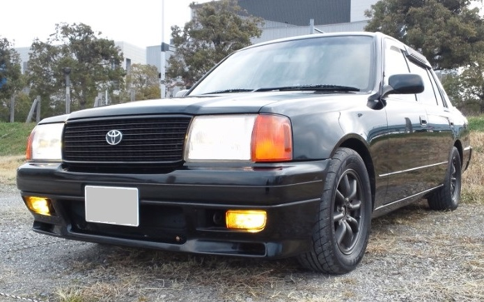 2012 01 tokyo